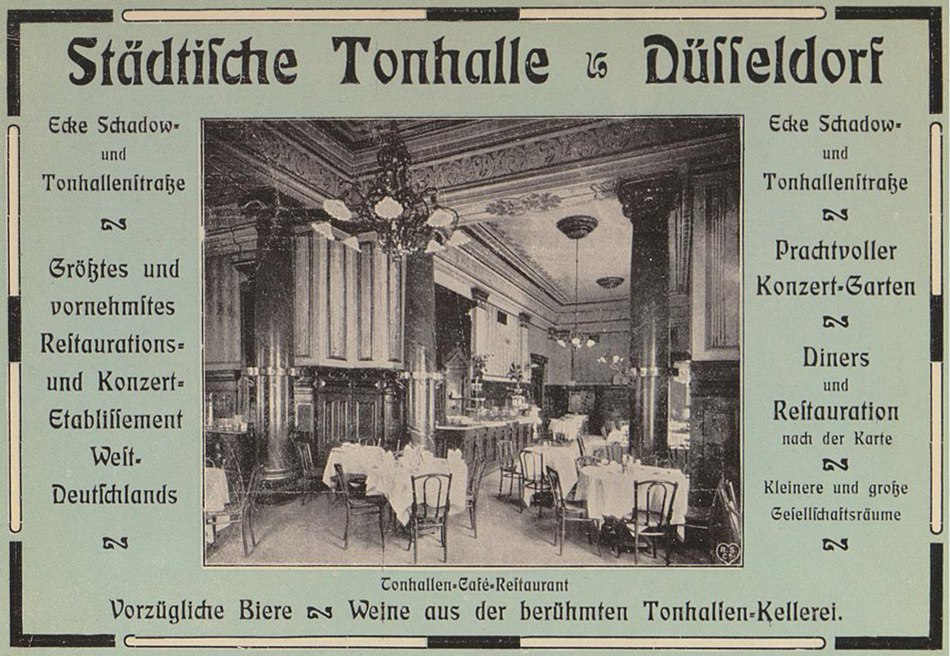 Tonhallen-Café-Restaurant, Städtische Tonhalle, Ecke Schadow- und Tonhallenstraße, Düsseldorf, 1905